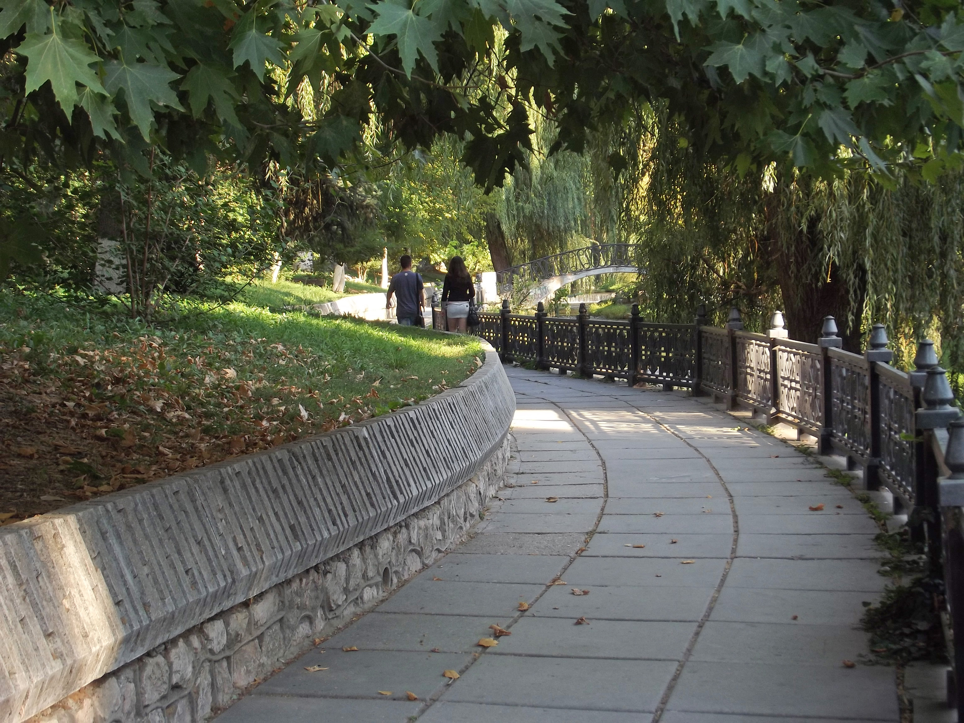 Набережная реки Салгир